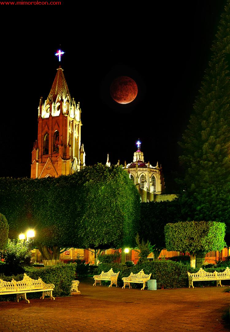 Foto del templo